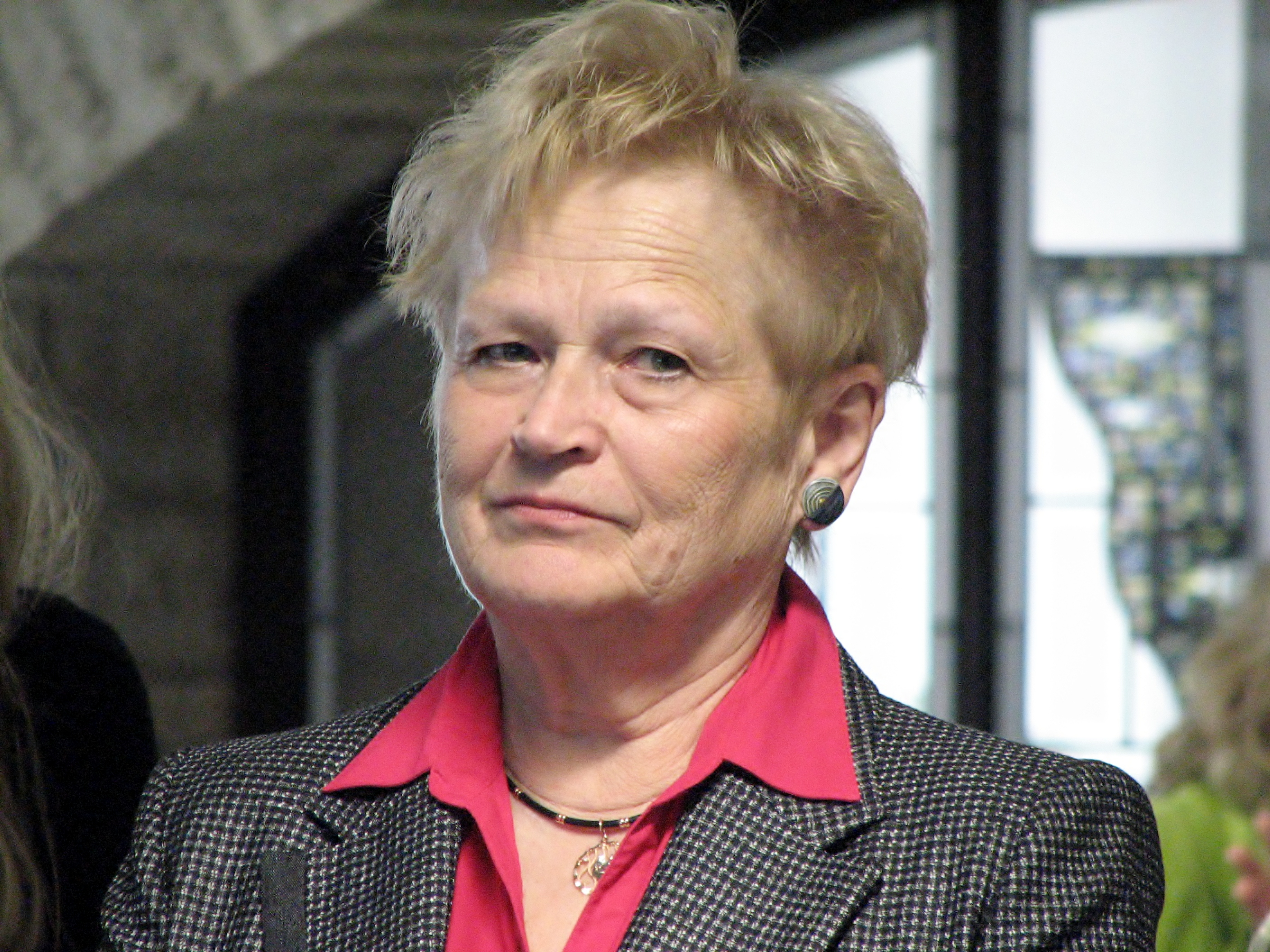 Sirje Endre Rahvusraamatukogu Eesti üldlaulupidude nootide digitaalkogu esitlusel